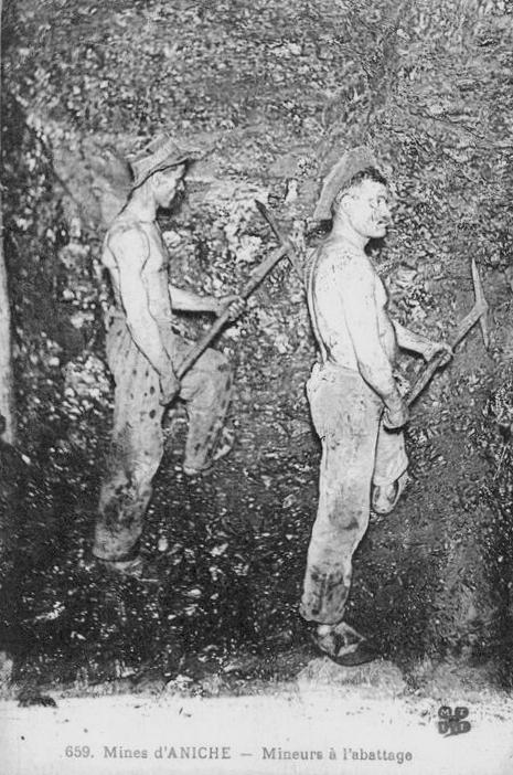 Mines d'Aniche - Mineurs à l'abattage